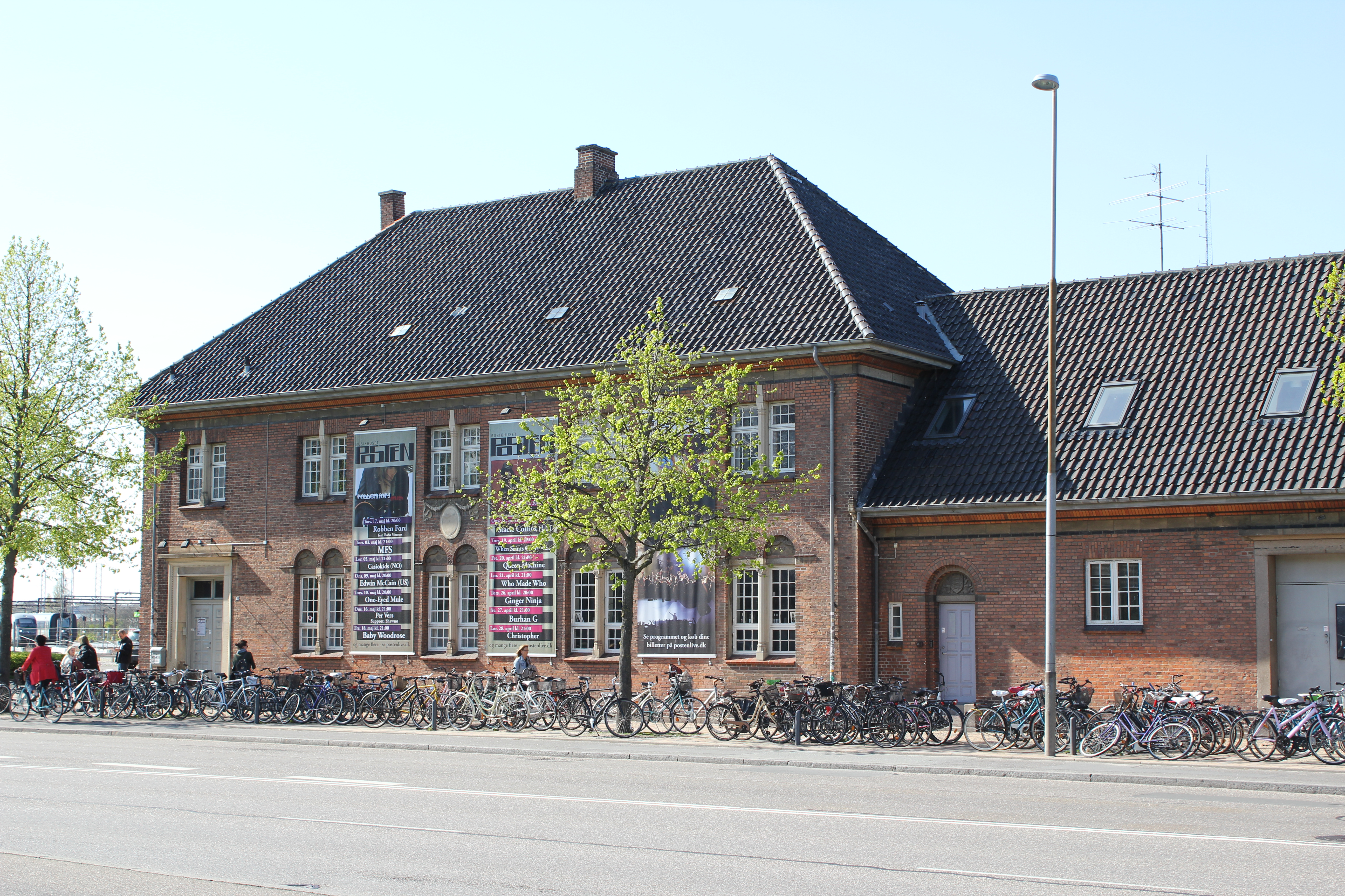 Musikhuset Posten 1.maj 2012